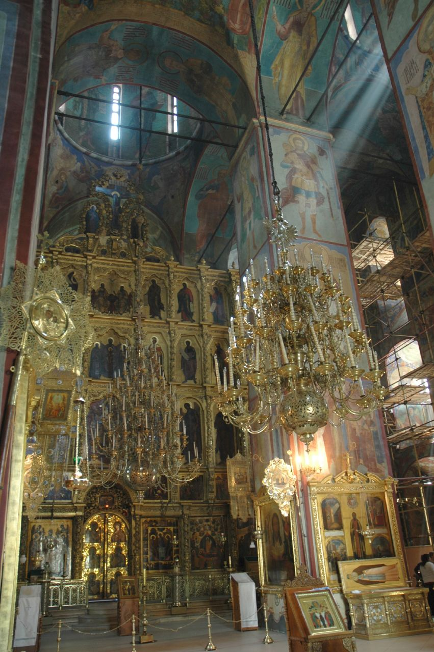 Успенский собор Свято-Троицкой Сергиевой Лавры. 1585 год. (Сергиев Посад)